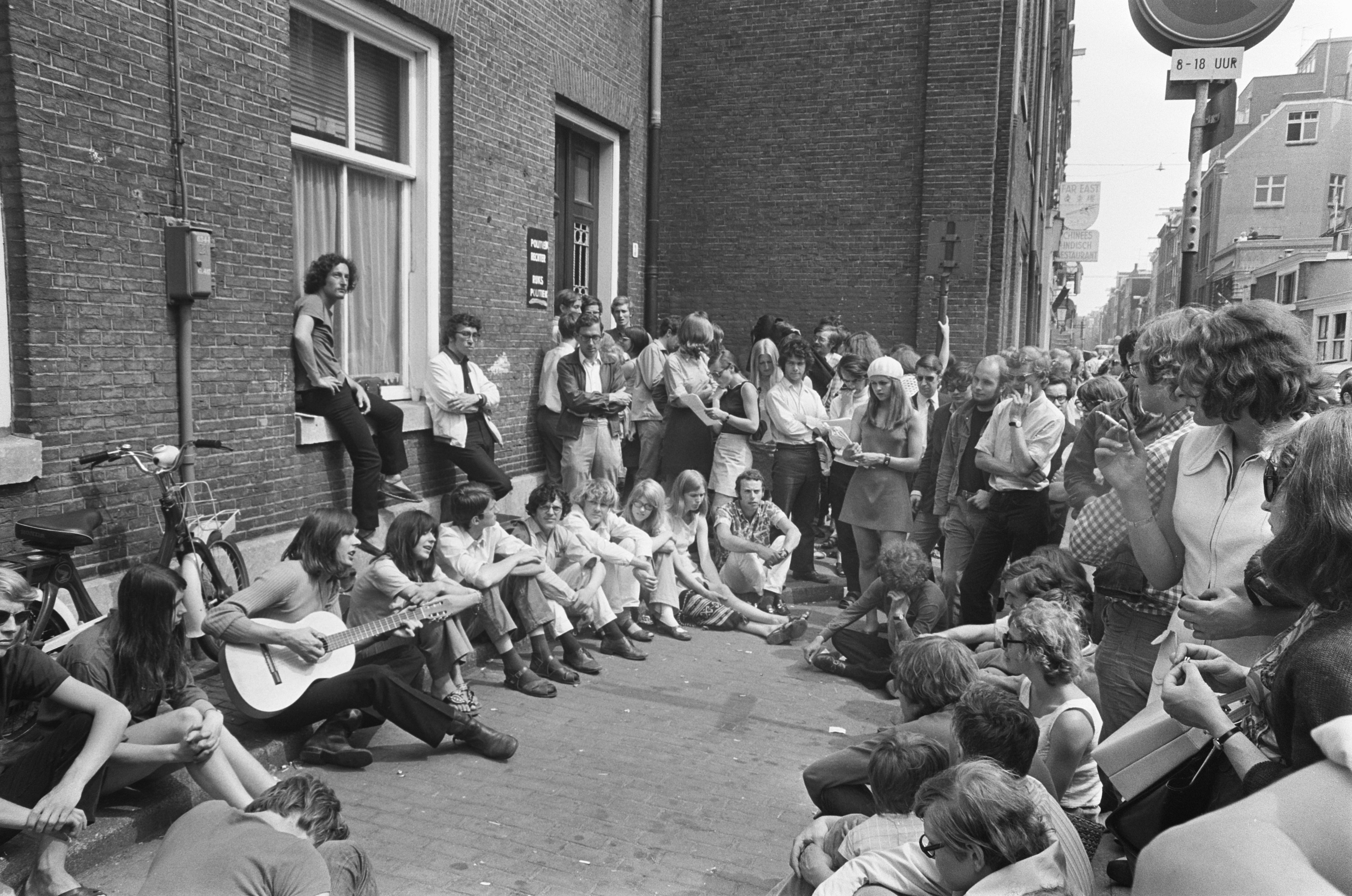 Voor het gerechtsgebouw in Amsterdam waar de Maagdenhuisbezetters berecht worden, zingen Rikkert Zuiderveld en Elly Nieman. Datum 16 juni 1969